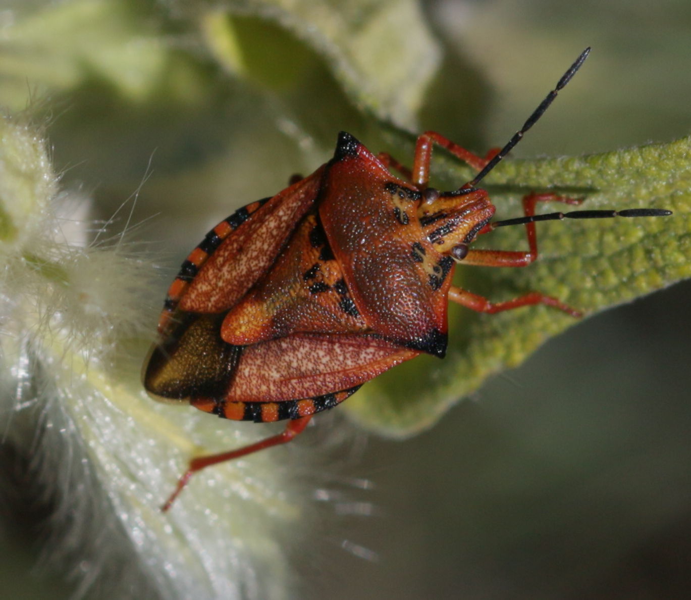 Tosos, Aragon, Spain